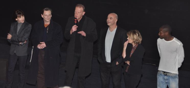 L'équipe du film "Arrêtez-moi" à une avant-première. De gauche à droite: Sophie Marceau, Marc Barbé, Jean Teulé, Jean-Paul Lilienfeld, Miou-Miou, Yann Ebonge